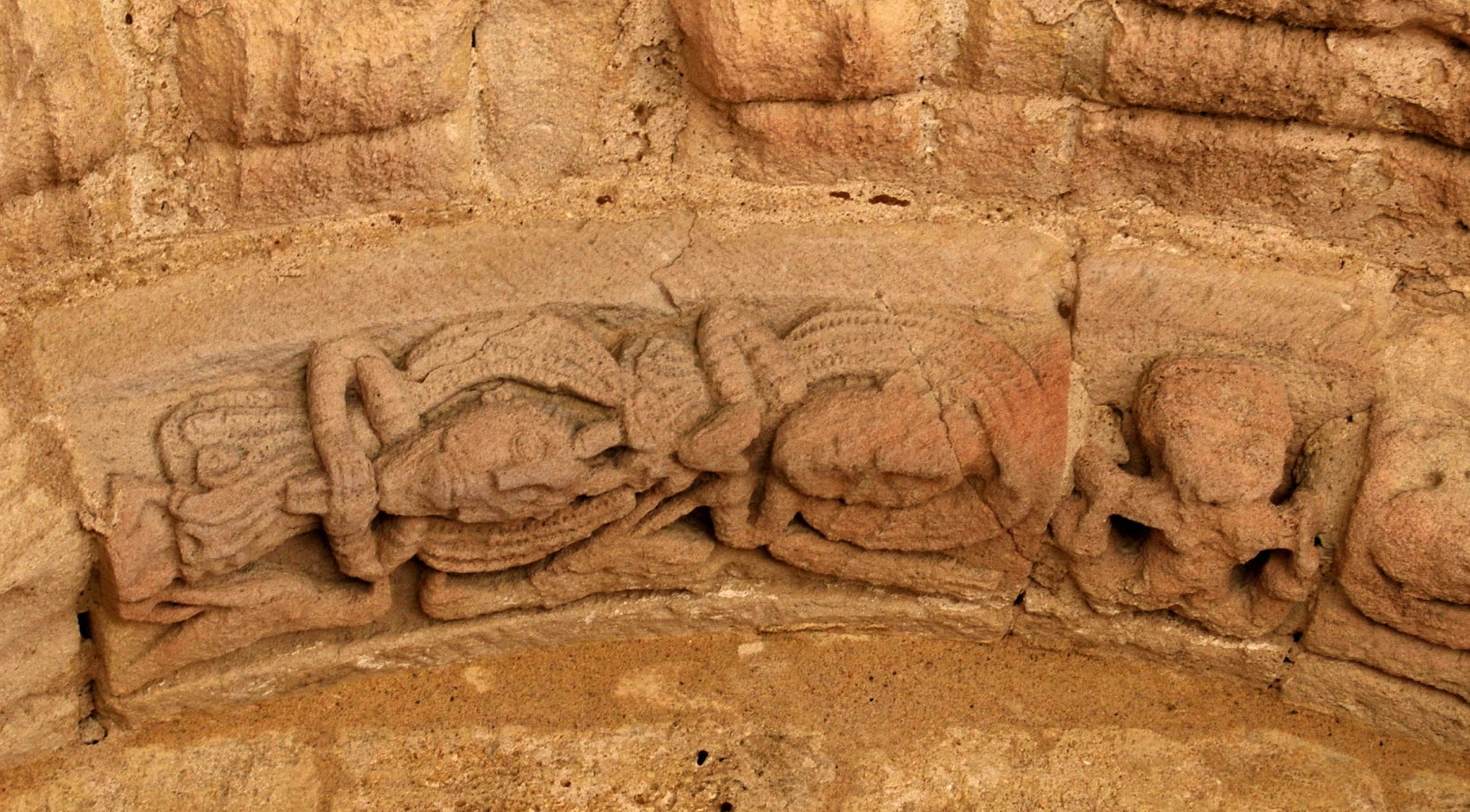 Portail de l'église Saint-Martin de Jugazan